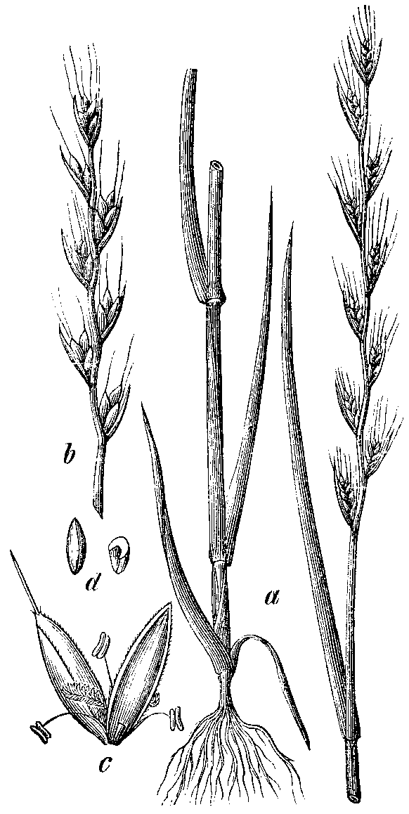 Slika 147. Omotna ljulika. (Lólium temuléntum.)